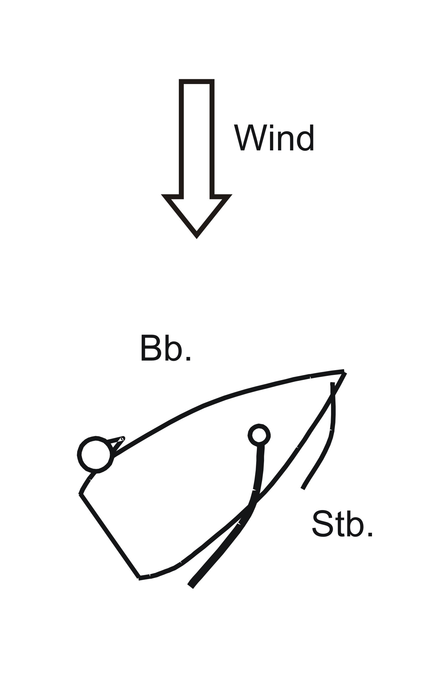 Führung des Großsegels auf der Steuerbordseite: Steuerbordbug